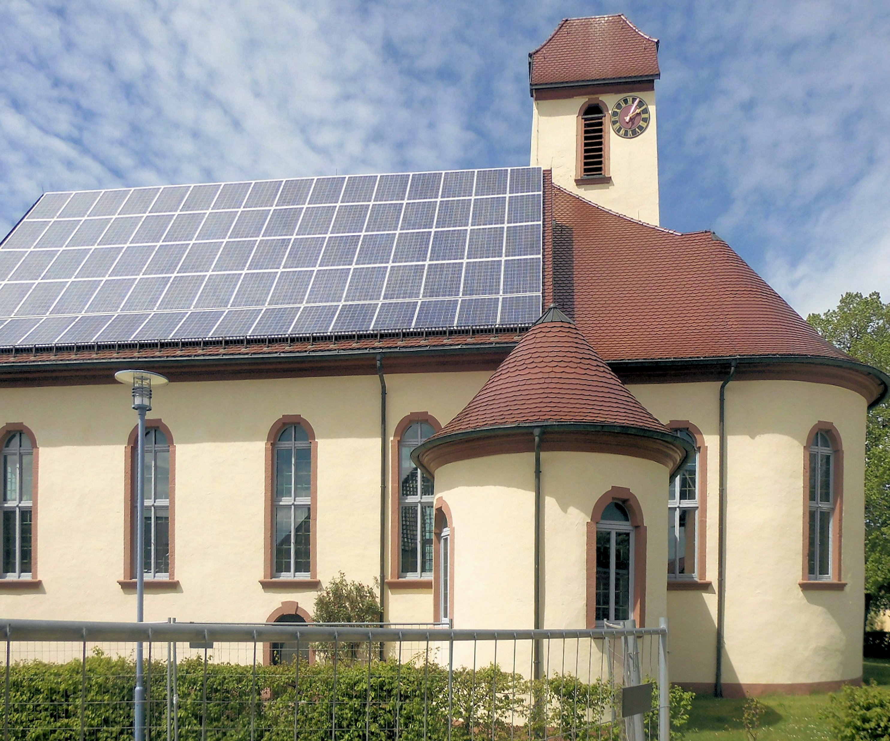 Südseite der evangelischen Kirche in Obernaldingen, Stadt Bad Dürrheim, Deutschland